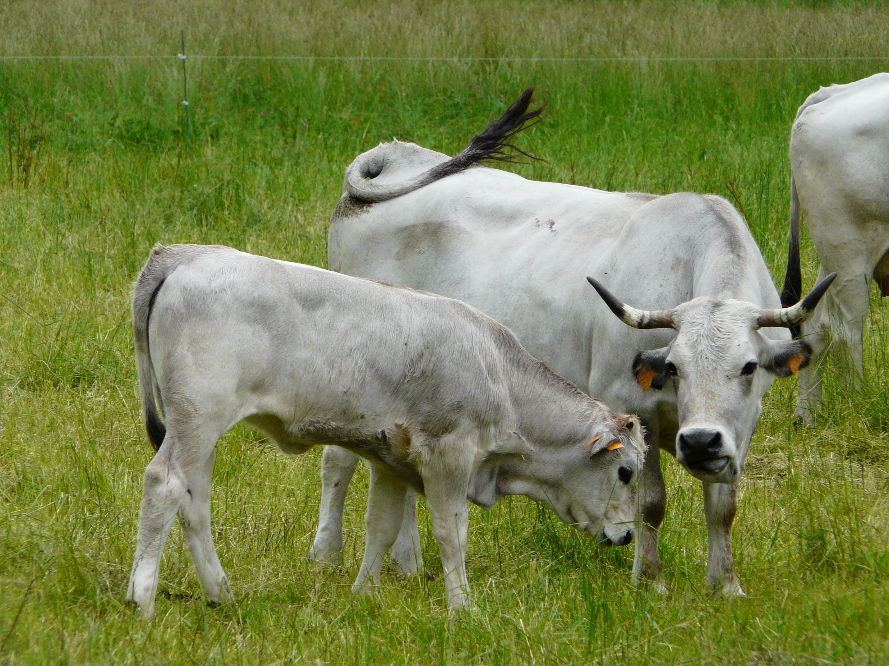 Vache et veau de la race gasconne à Antignac, Haute-Garonne, France.